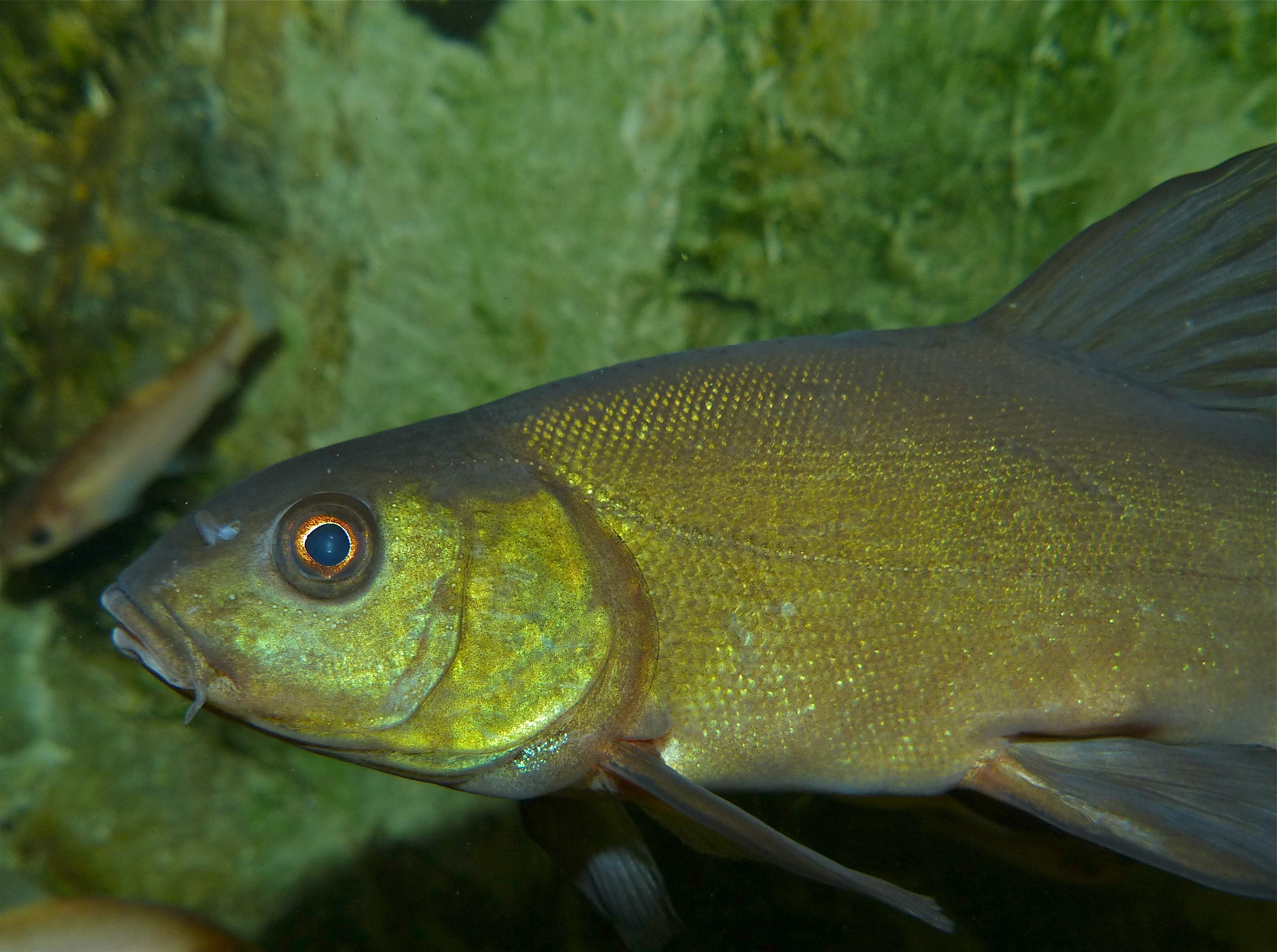 Aquarium du Val-de-Loire, Lussault-sur-Loire, Indre-et-Loire, FRANCE